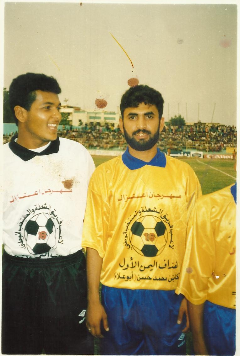 صورة الكابتن اسعد محمد عبده مع الكابتن جياب باشافعي